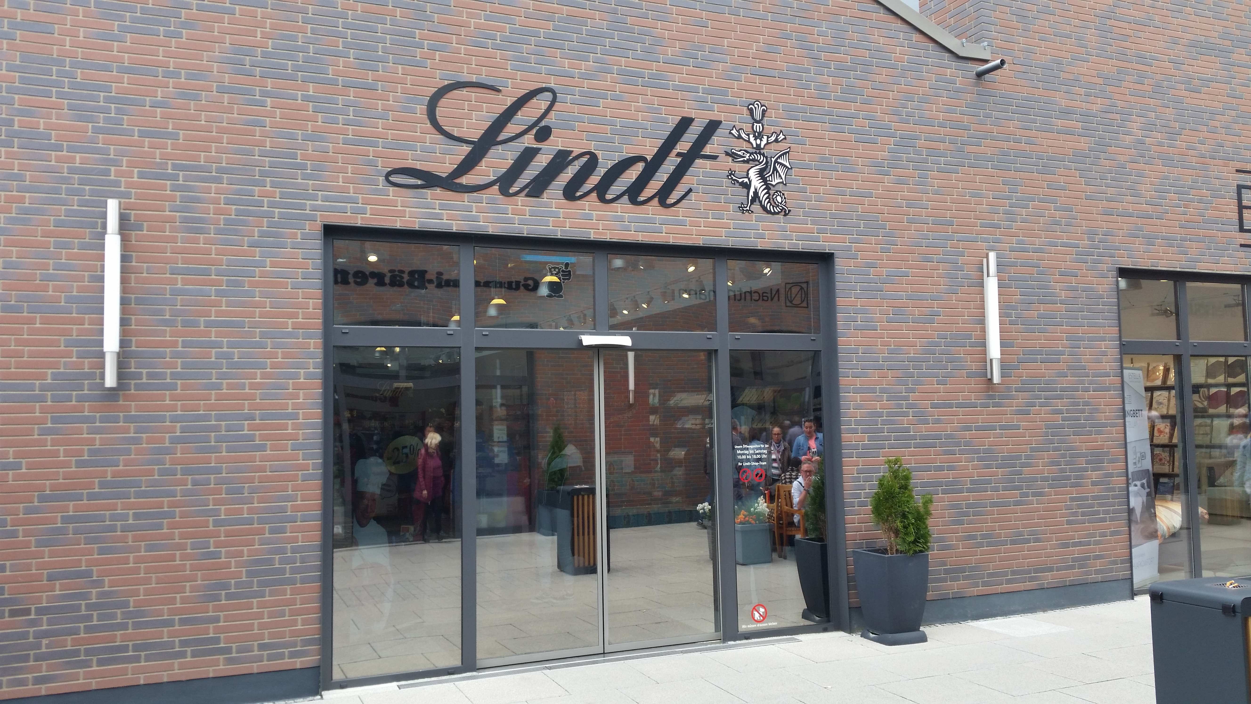 Lindt-Ladengeschäft